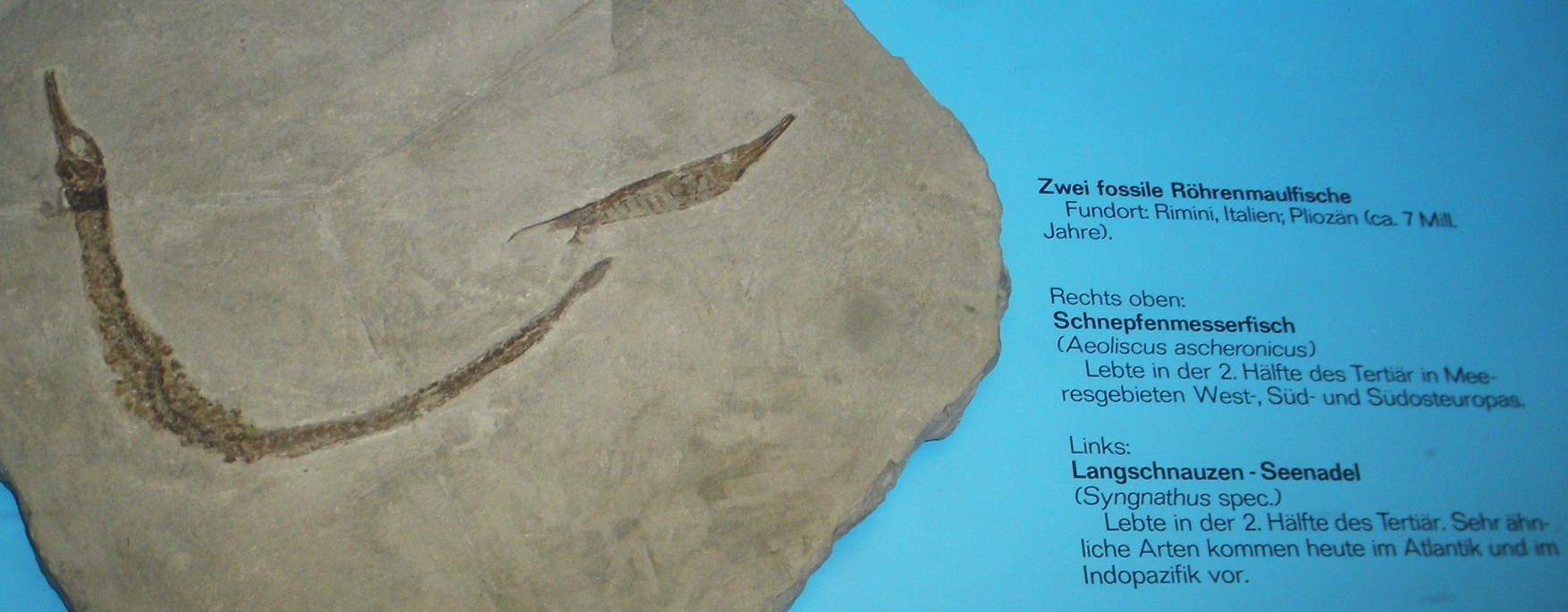 Fossil of Sygnathus and Aeoliscus, extinct fishes- Took the photo at Senckenberg Museum of Frankfurt